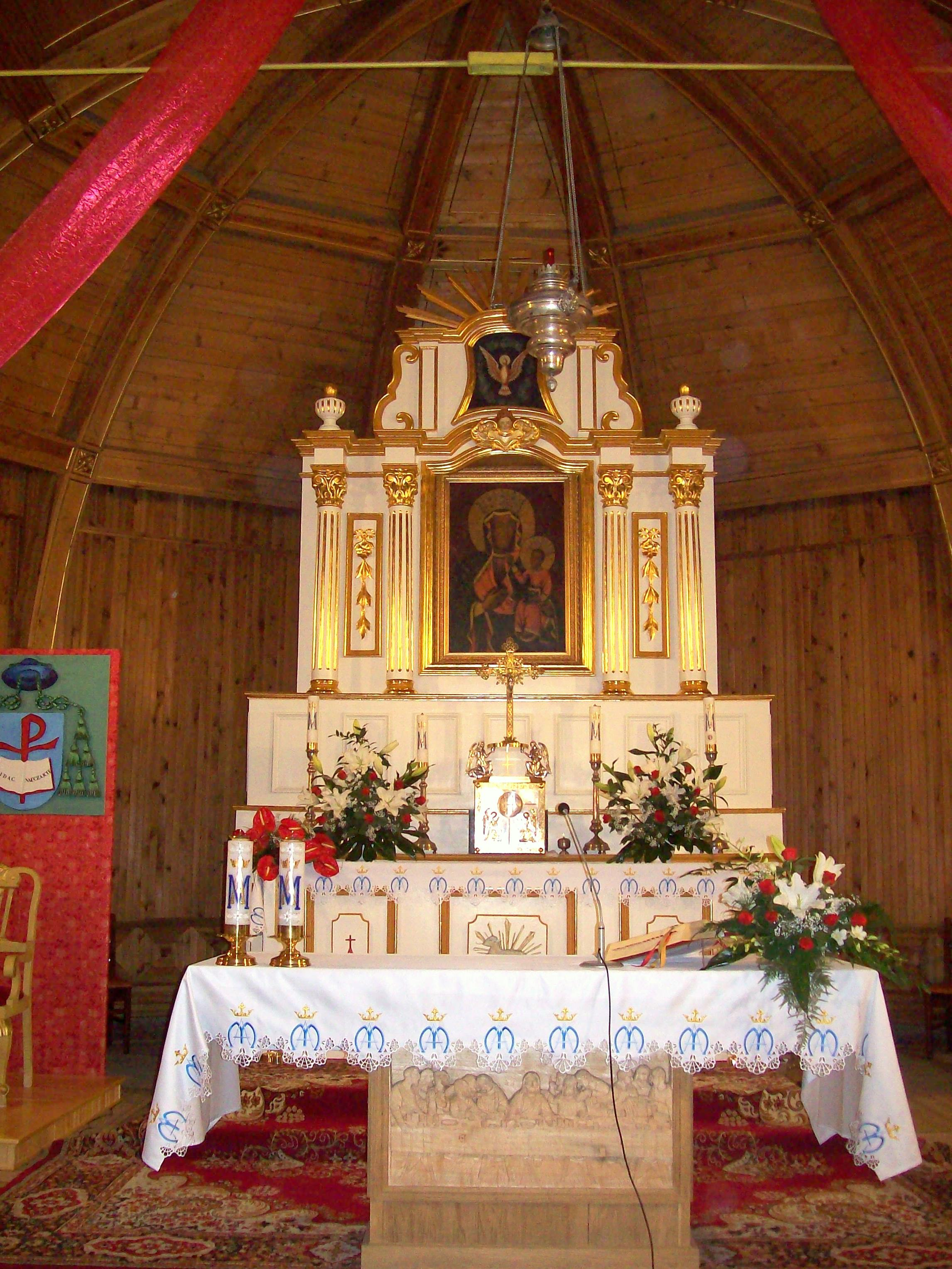 Ołtarz główny w kościele pw. Narodzenia NMP w Świętym Miejscu